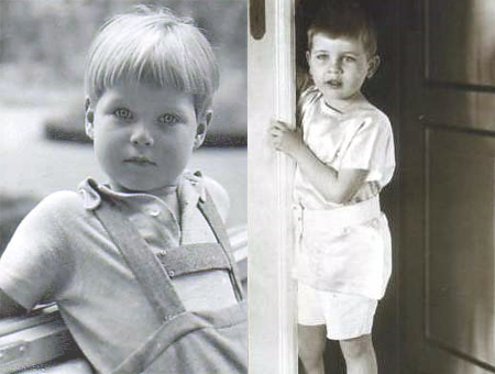 Die beiden Prinzen Alexander (li., im Jahr 1937) und Ludwig (1934/35)